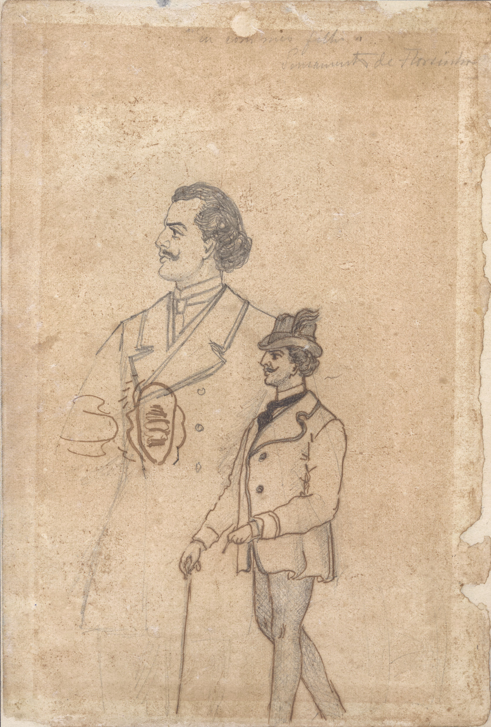 Auto-retrato de Castro Alves (1847-1871).